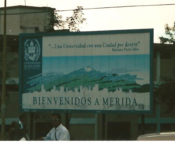 "Una universidad con una ciudad por dentro - eine Universität mit einer Stadt darinnen." Selbstverständnis der Universidad Andina de Mérida/Venezuela. Inzwischen ist das Plakat abgenommen worden.